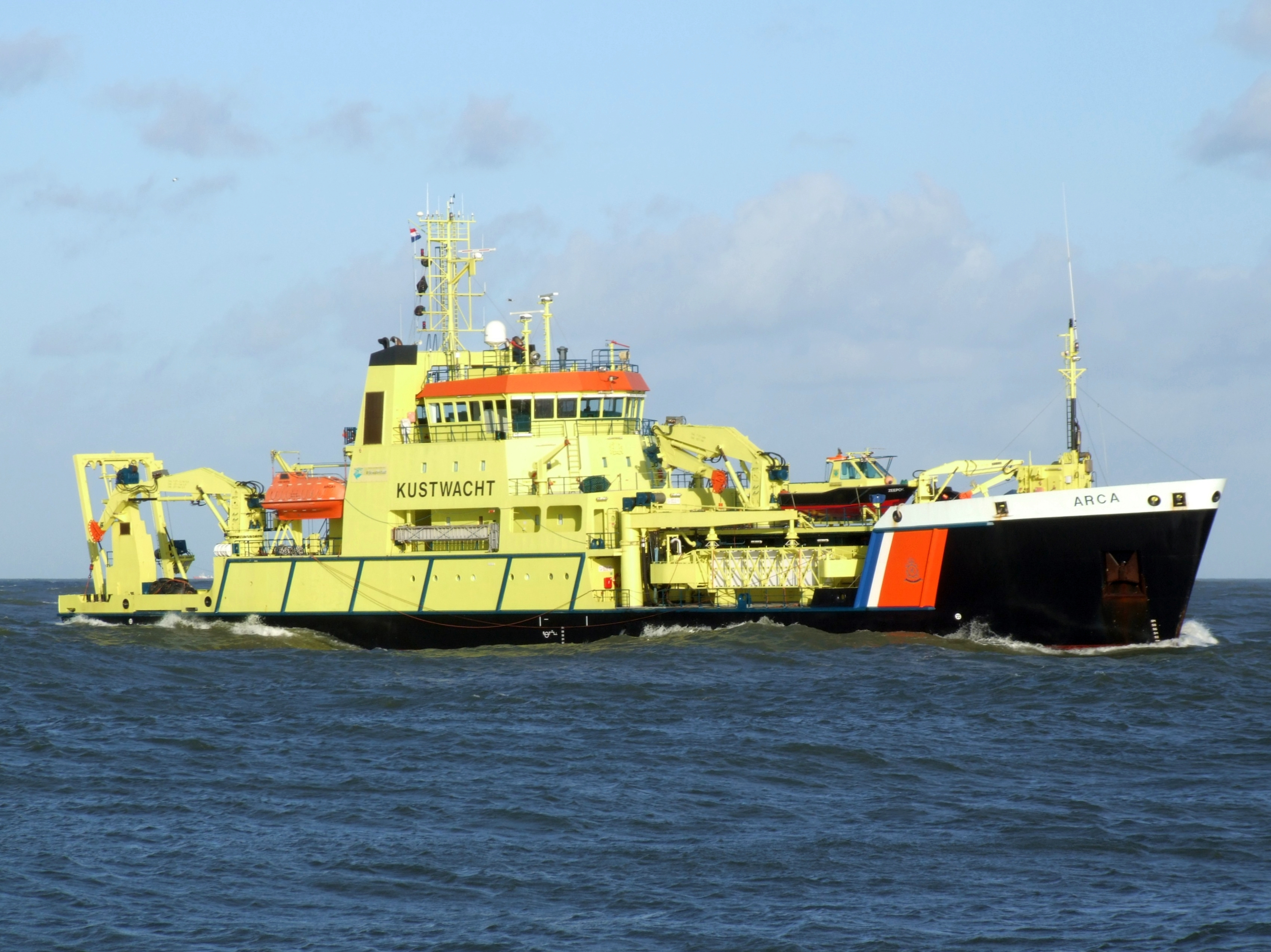 Arca IMO 9167966